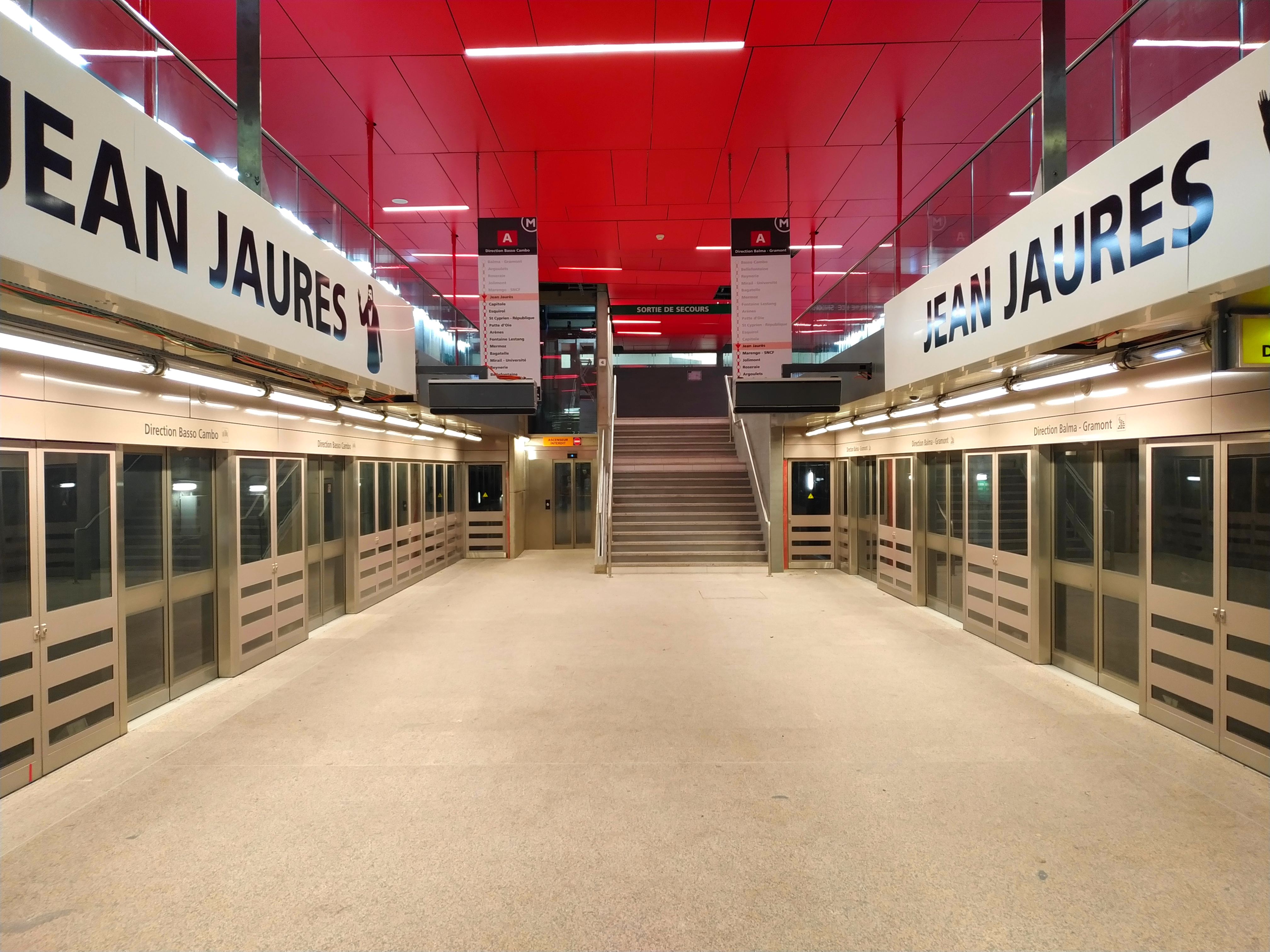 Extension de 26 à 52 mètres du quai de la station Jean Jaurès sur la ligne A du métro de Toulouse.